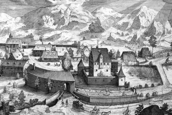 Ansicht von Hammerwerk und Herrensitz Oberhirschbach mit Allianzwappen der Geschlechter Gugel und Meindel. Anonymer Kupferstich, frühes 17. Jahrhundert